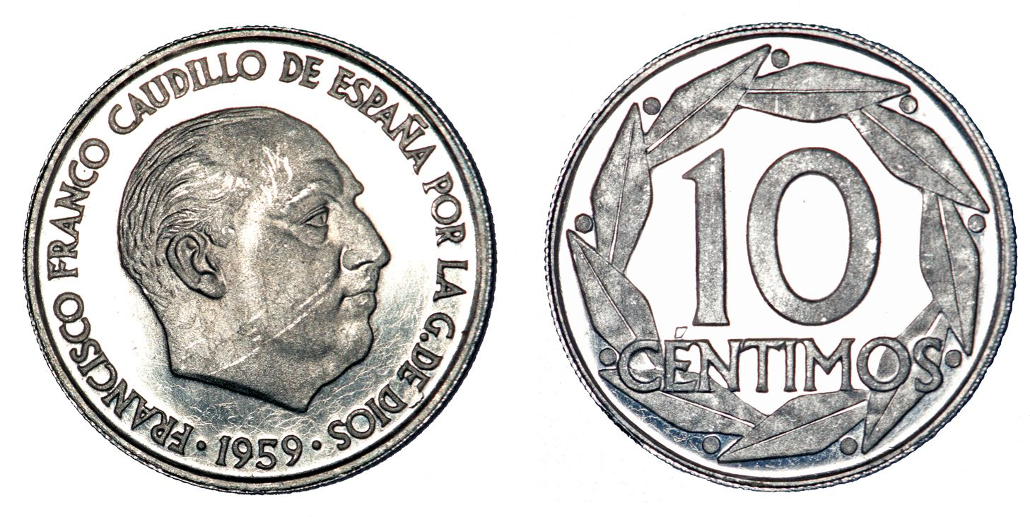 10 Céntimos 1959